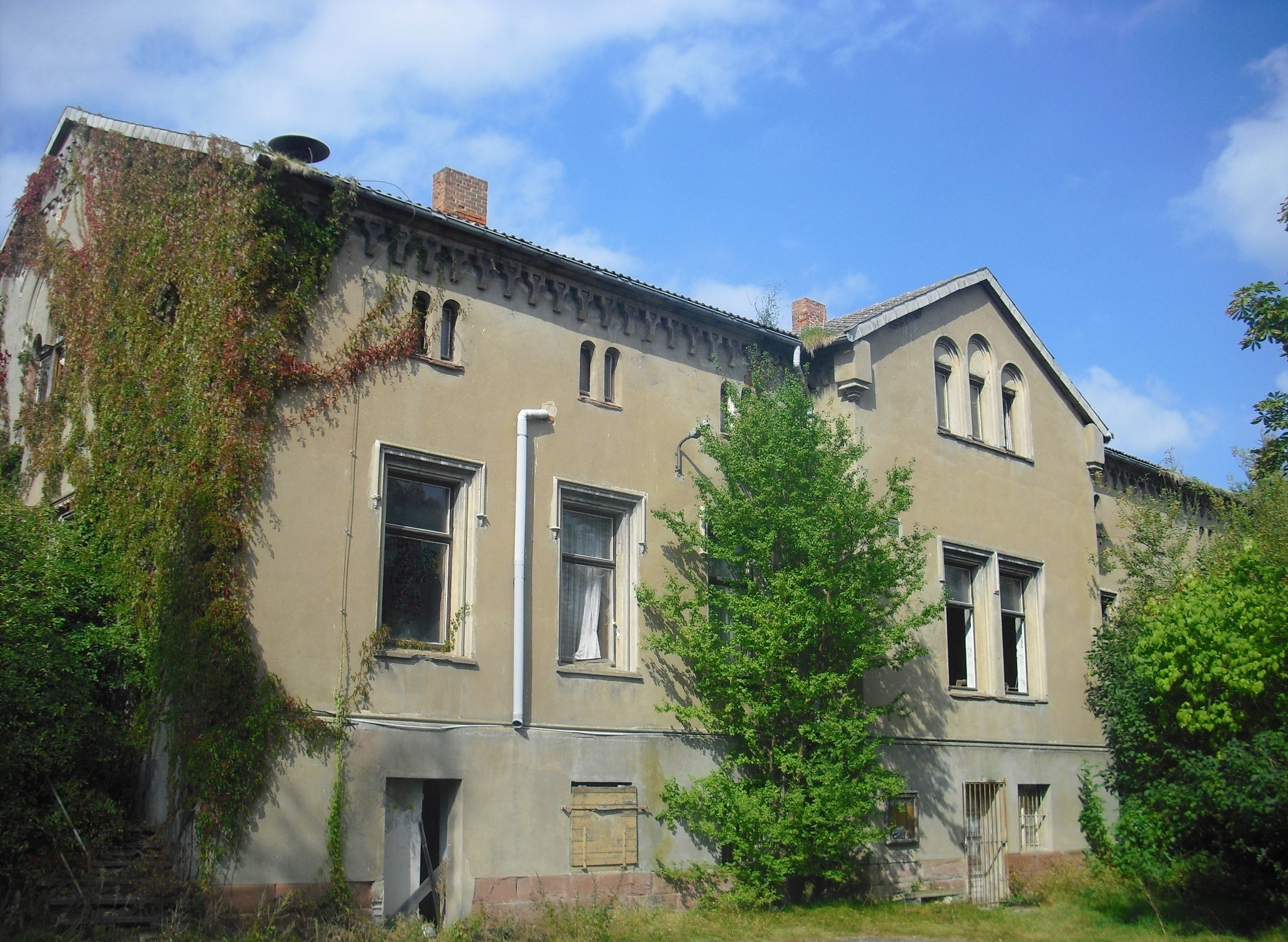 Gut Hasselburg, Gemeinde Flechtingen-Hasselburg (Foto: Kora Duberow)